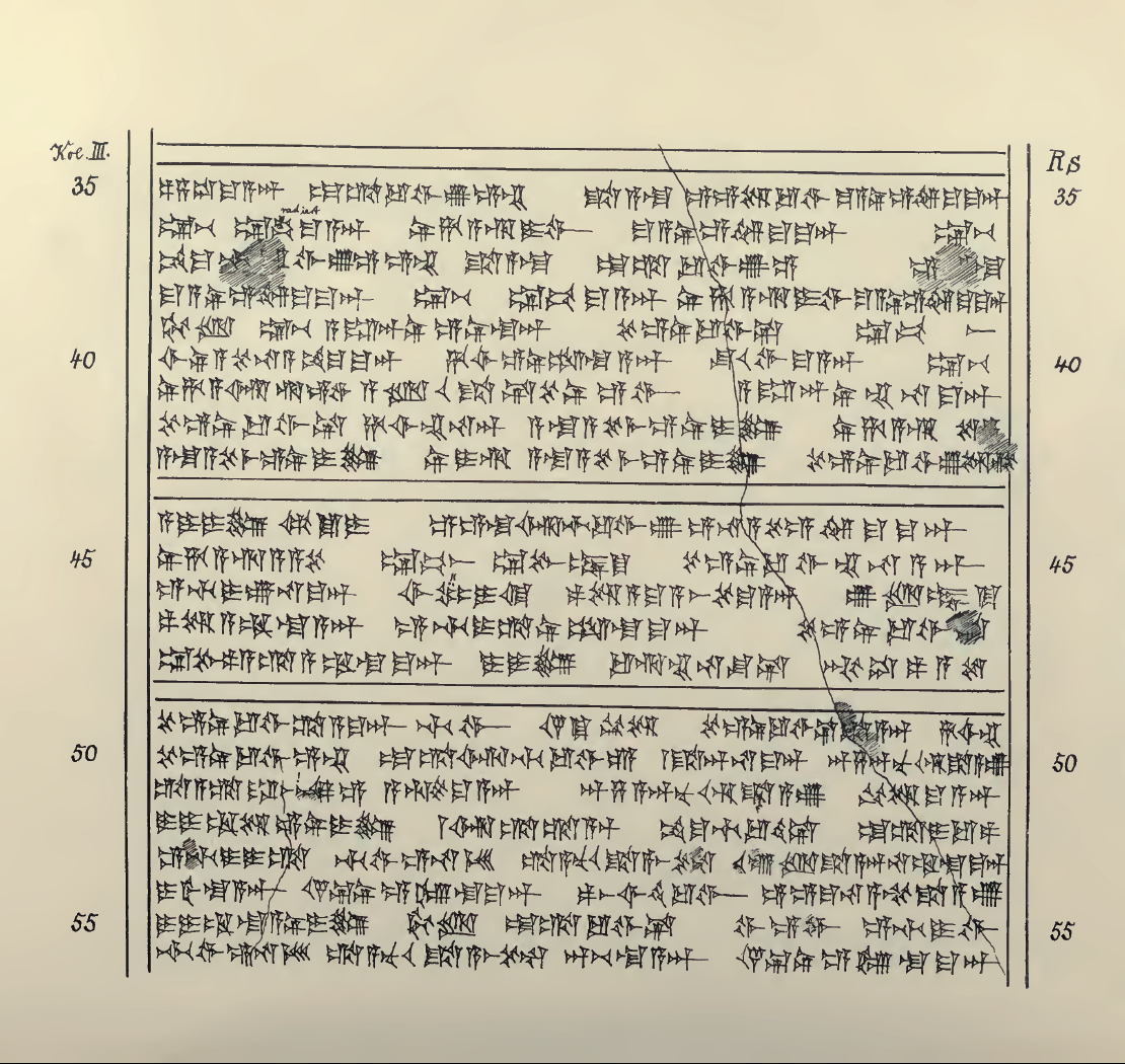 List Tuszratty do Amenhotepa III w języku huryckim – autografia.